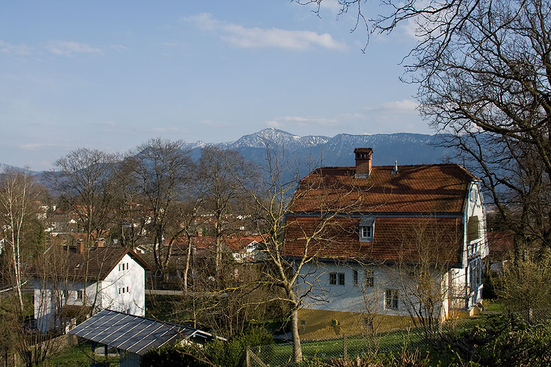 Das Münterhaus in Murnau